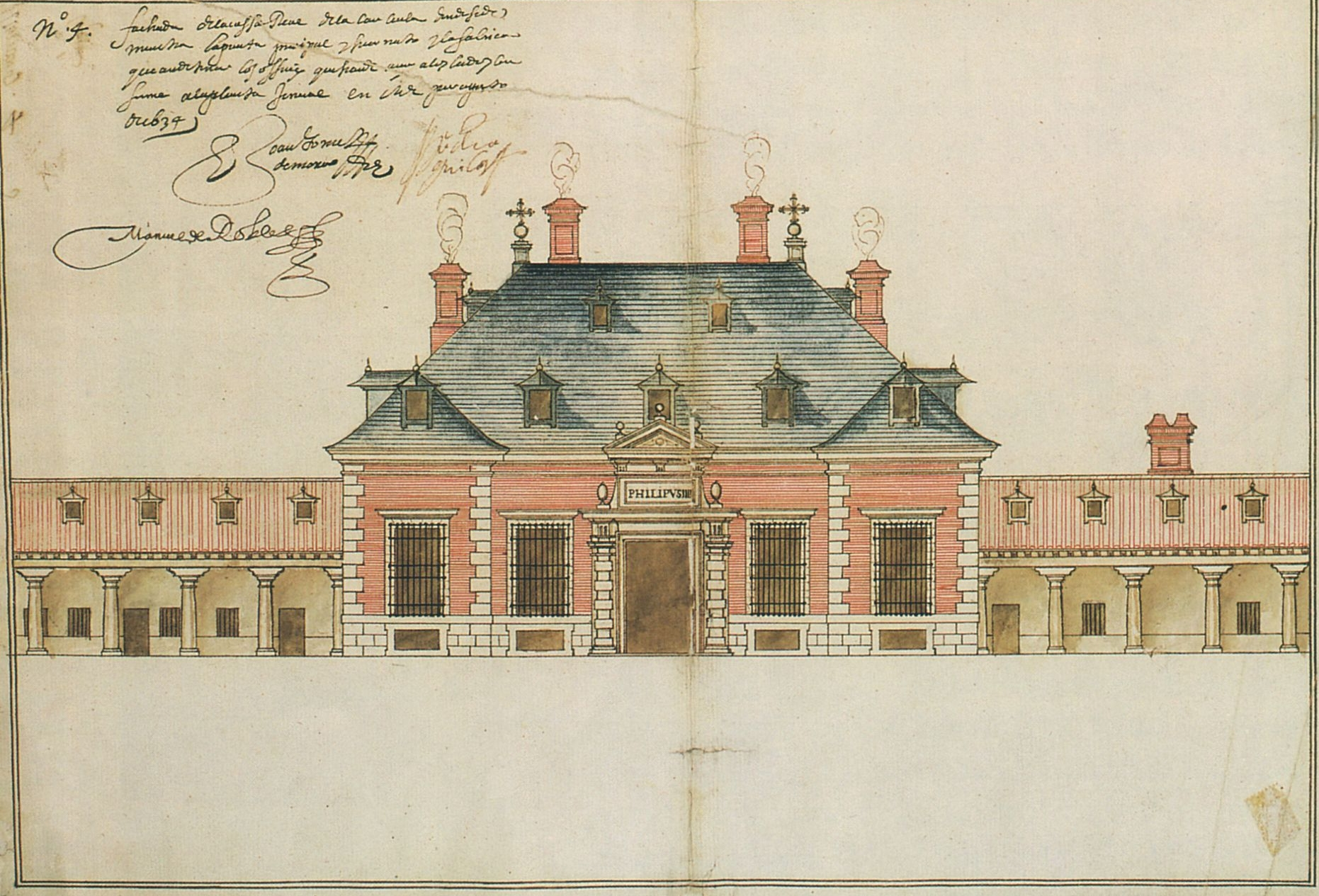 Fachada de la Casa Real de la Çarçuela, donde se de / muestra la puerta principal y su ornato, y la fábrica / que [h]an de tener los officiosque se [h]an de [h]açer, a los lados, con / forme a la planta general. En Madrid, por agosto / sw 1634. / Juan Gómez de Mora [fdo. y rdo.]. Manuel de Robles [fdo. y rdo.].Juan de Aguila [fdo. y rdo.].